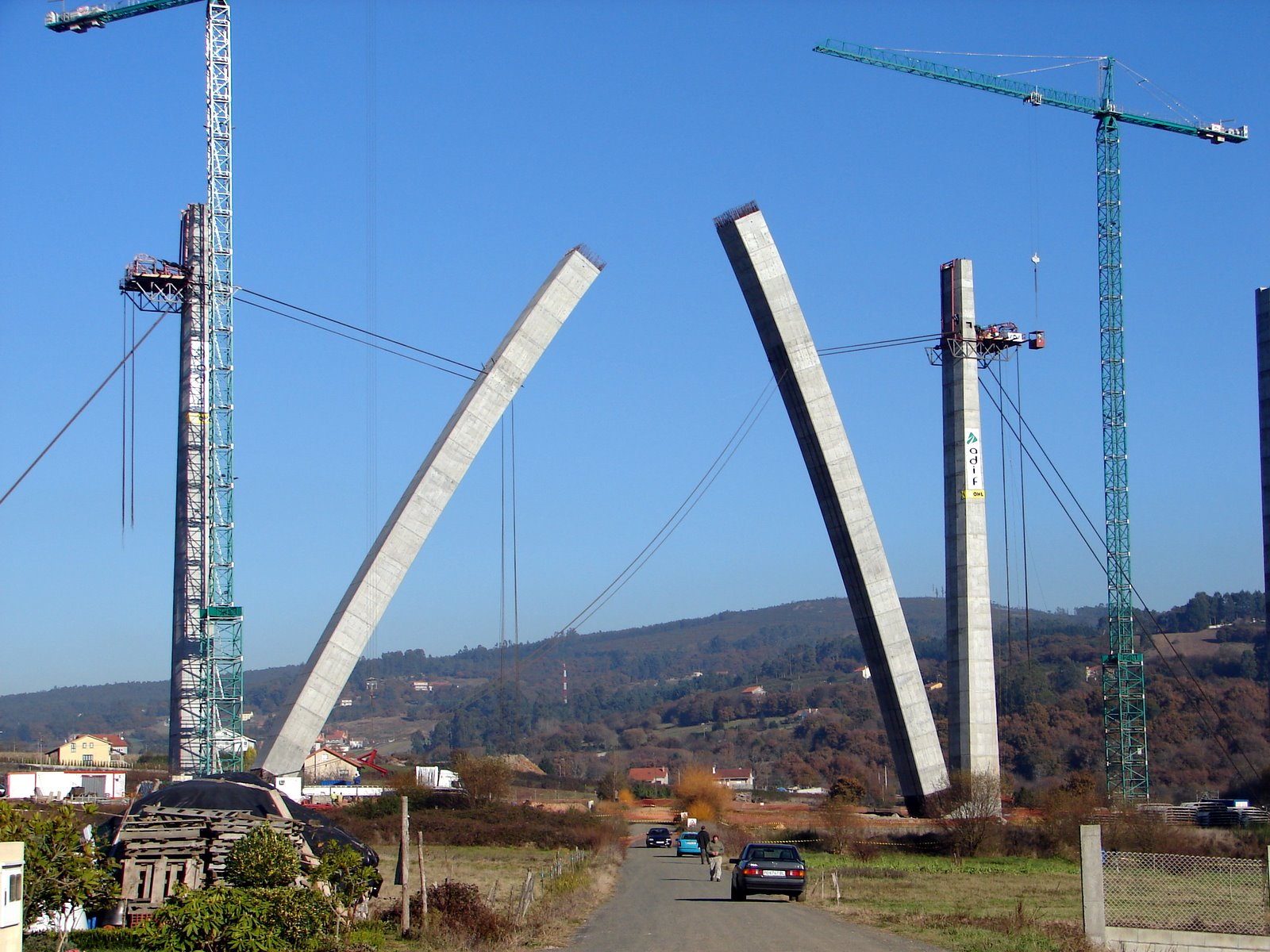 Evolución de la obras de construcción del viaducto del Tren de Alta Velocidad en las proximidades de Santiago de Compostela. La evolución transcurre entre los años 2005 y 2008. En las últims fotos de puede ver la formación del arco central del viaducto, construyendo dos grandes pilares que luego se inclinan y aproximan, y luego se continúa la construcción reforzando las basesd y la unión superior.